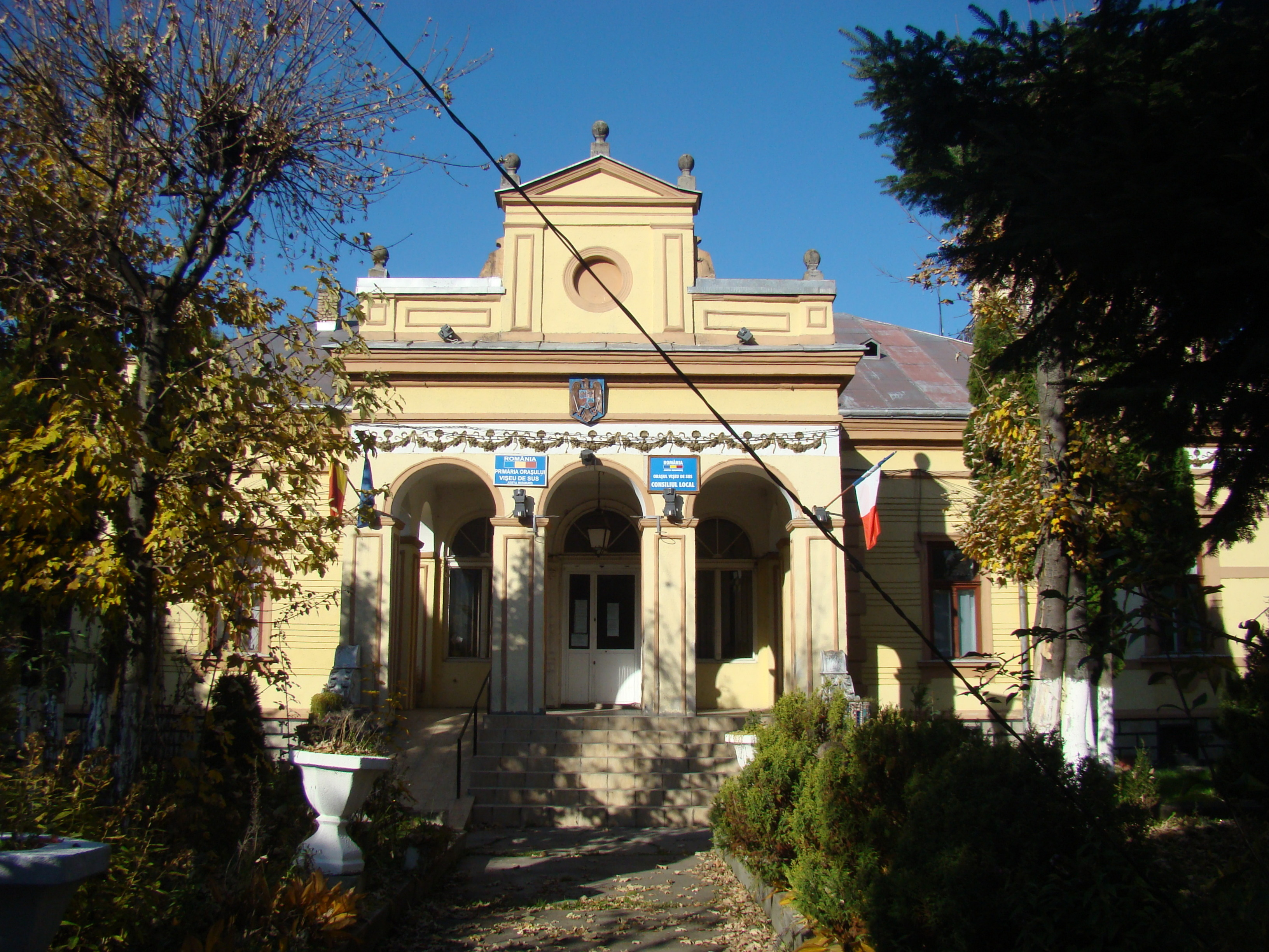 Casa Pop Simion, azi Primăria orașului Vișeu